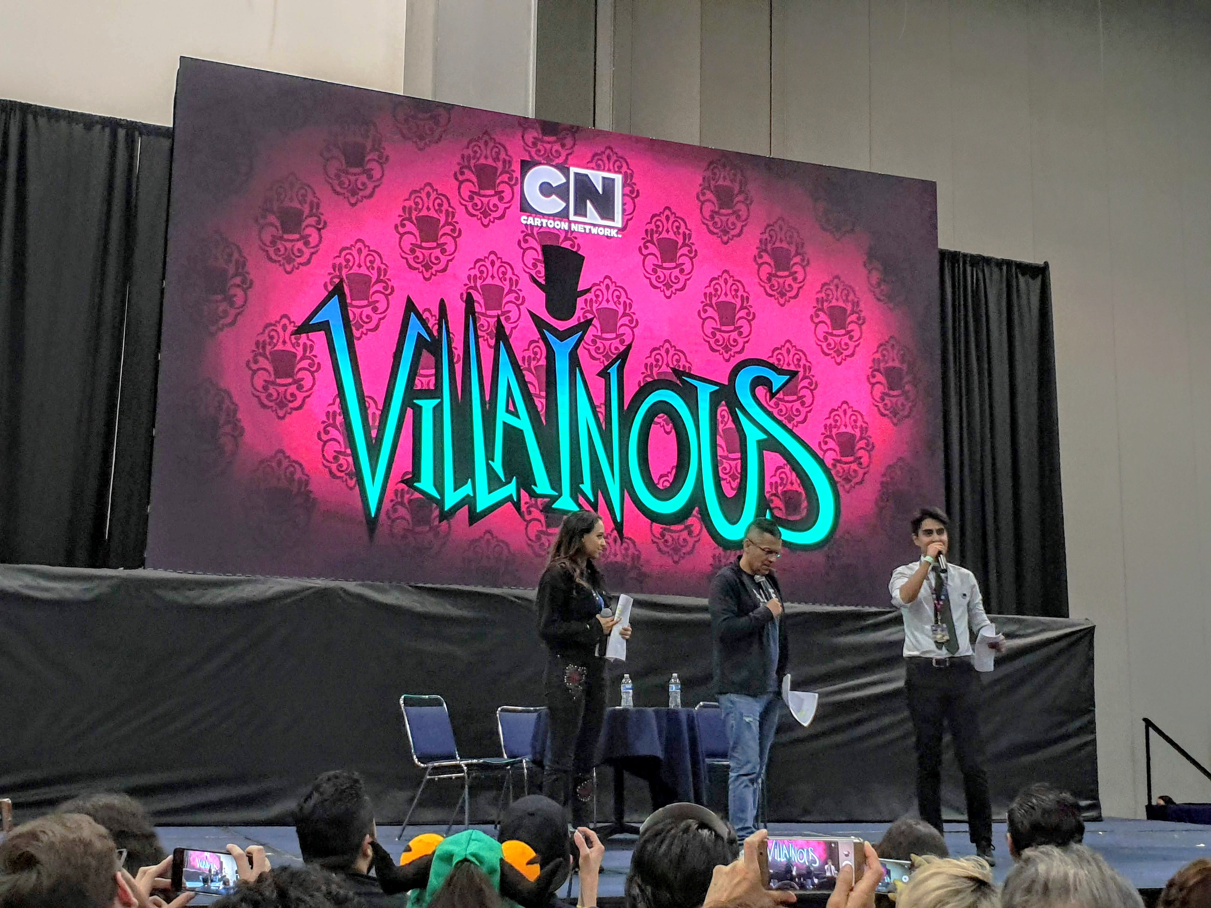 Conferencia con Alan Ituriel, Meli G y José Antonio Macías Carrano.